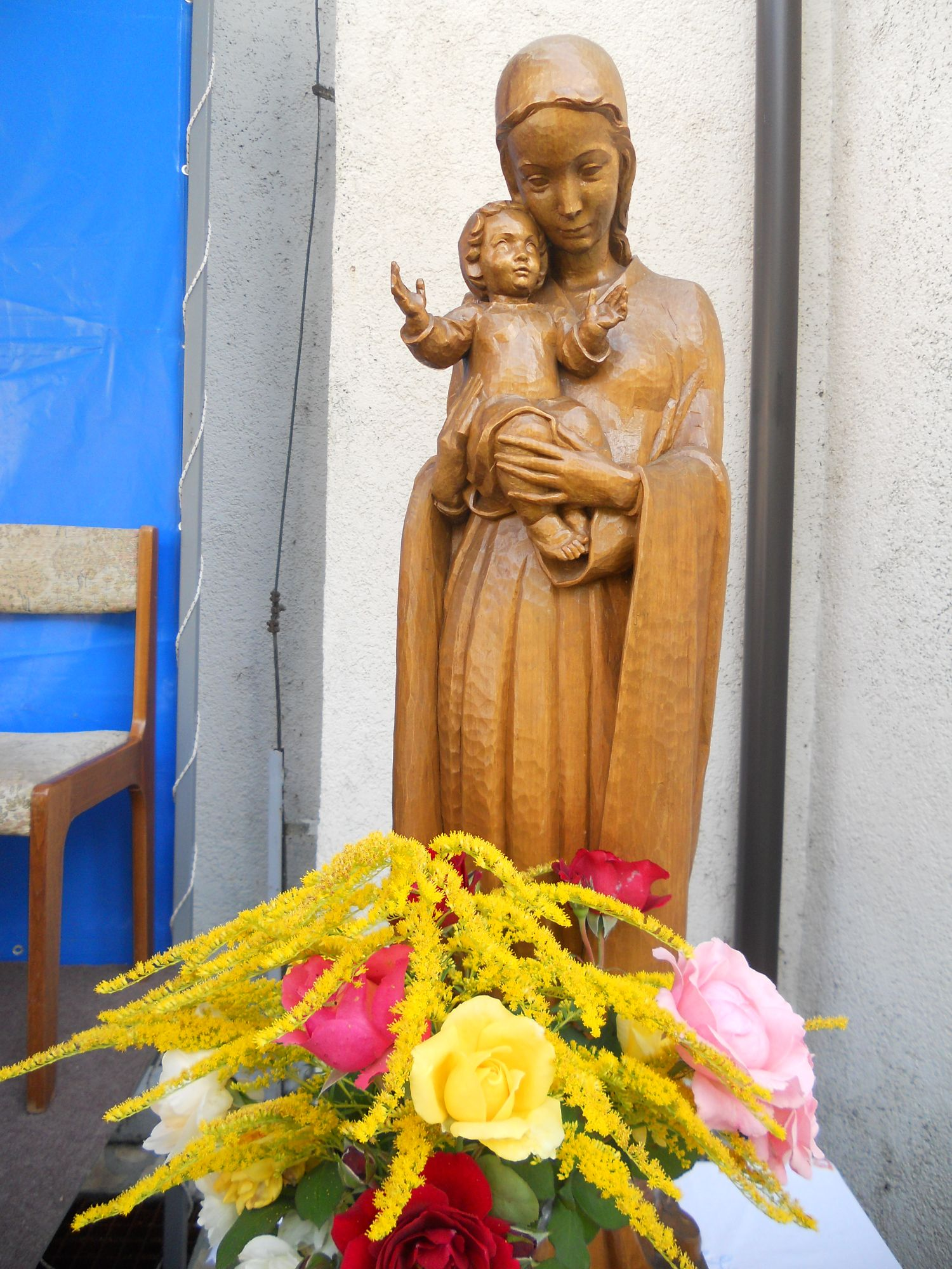 Gospin kip